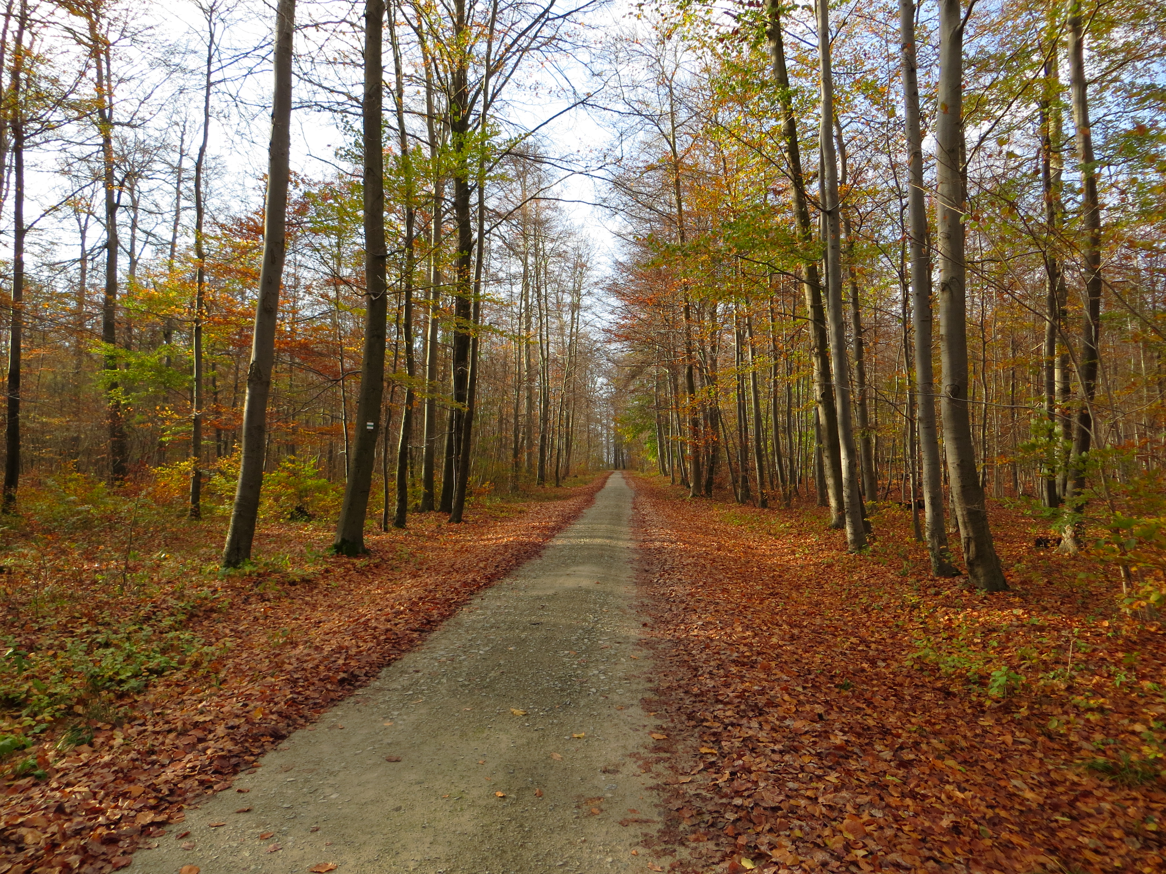 NSG Keulaer Wald, der Weg (Rondellstraße) zum Aussichtspunkt am Rondell (auch Rondel geschrieben)